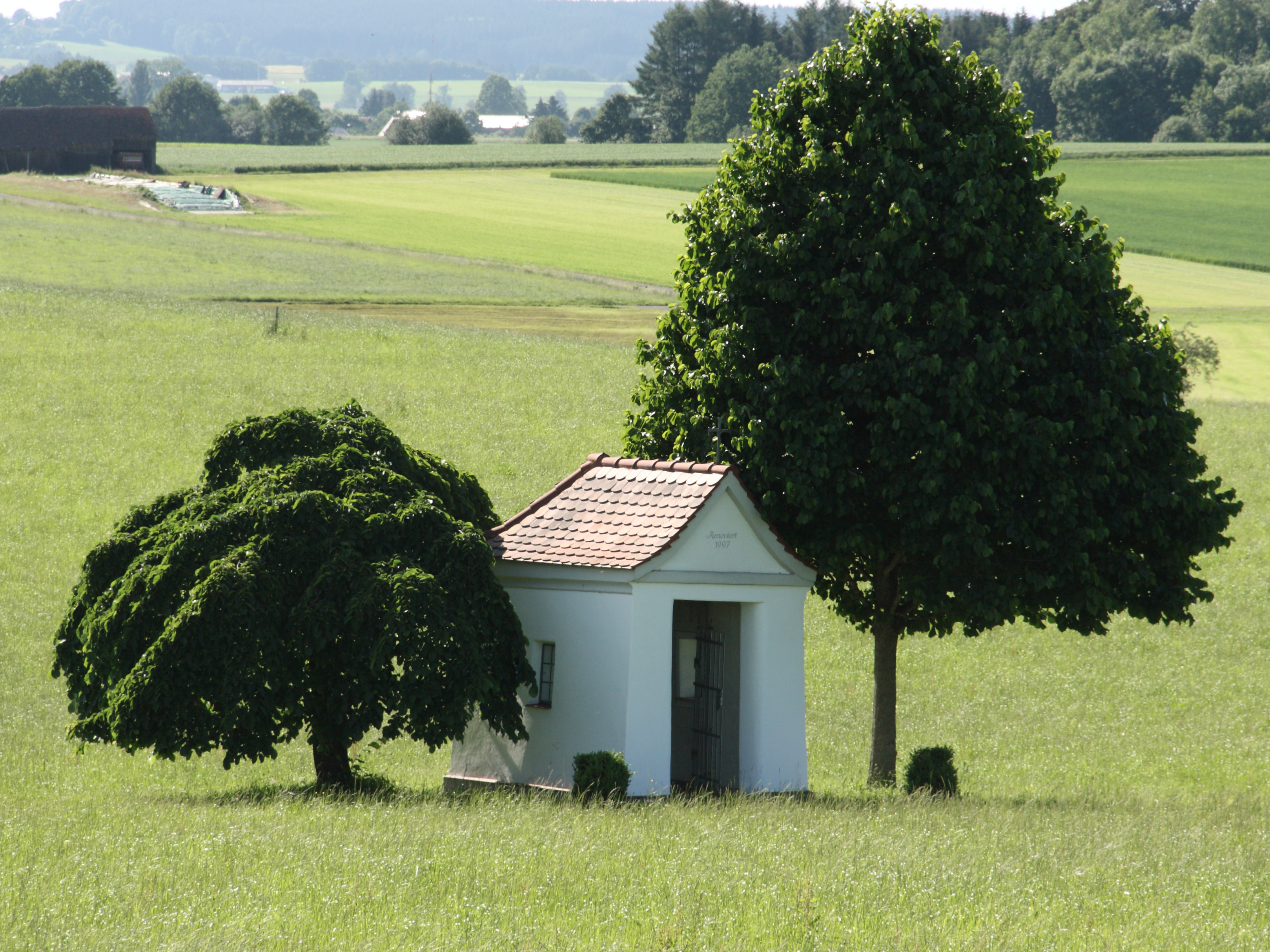 Feldkapelle am nördl. Ortsrand von Egelhofen